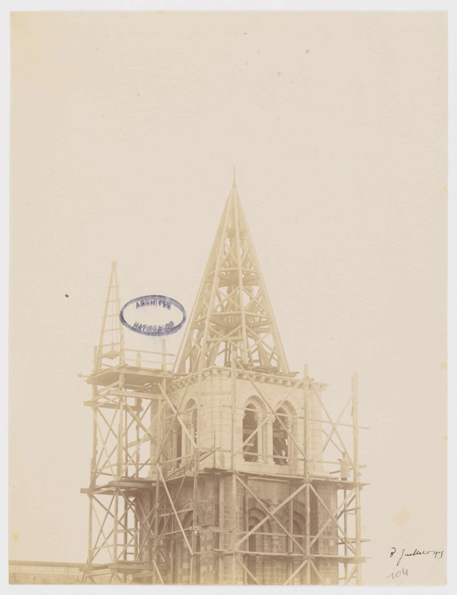 Reconstruction du clocher : vue de la partie haute du clocher, squelette de la charpente du clocher pourvu d'un échafaudage (avec un homme debout). Jointe au rapport de l'architecte diocésain du 11 juillet 1905. Mention à l'encre noire au recto 8 juillet 1905, mention manuscrite 104. Échelle : 1 cm / 1 m. Photographie issue des dossiers de travaux de restauration des cathédrales (1802-1912), conservés aux Archives nationales (inventaire et documents numérisés consultables en ligne).